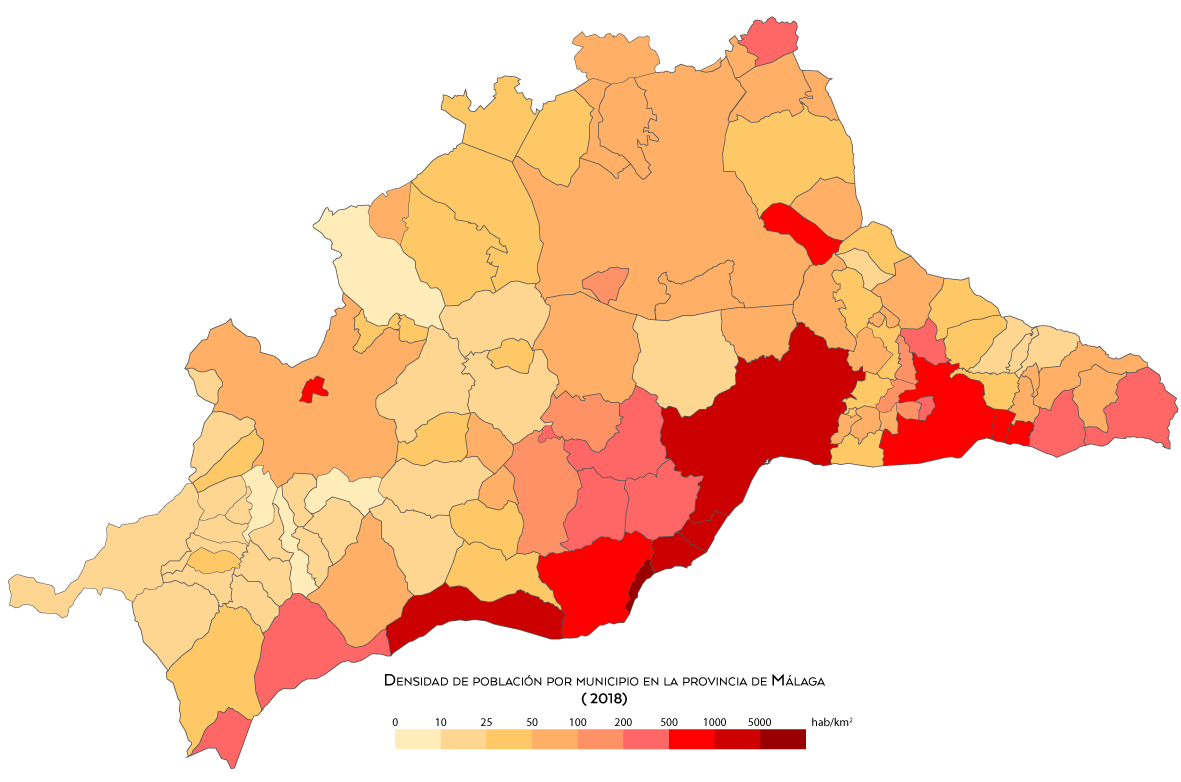 Densidad de población por municipio en la provincia de Málaga en 2018